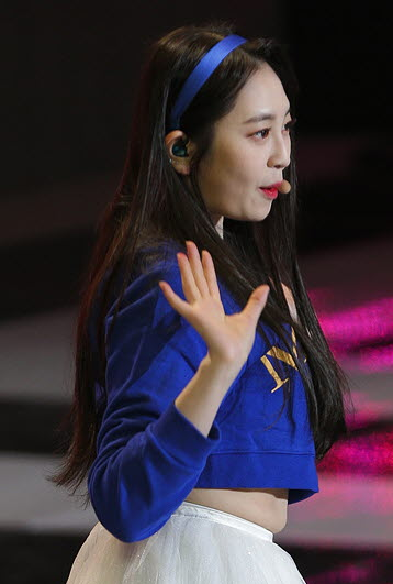 모모랜드(MOMOLAND) 평창 동계올림픽 G-10 특집 생방송